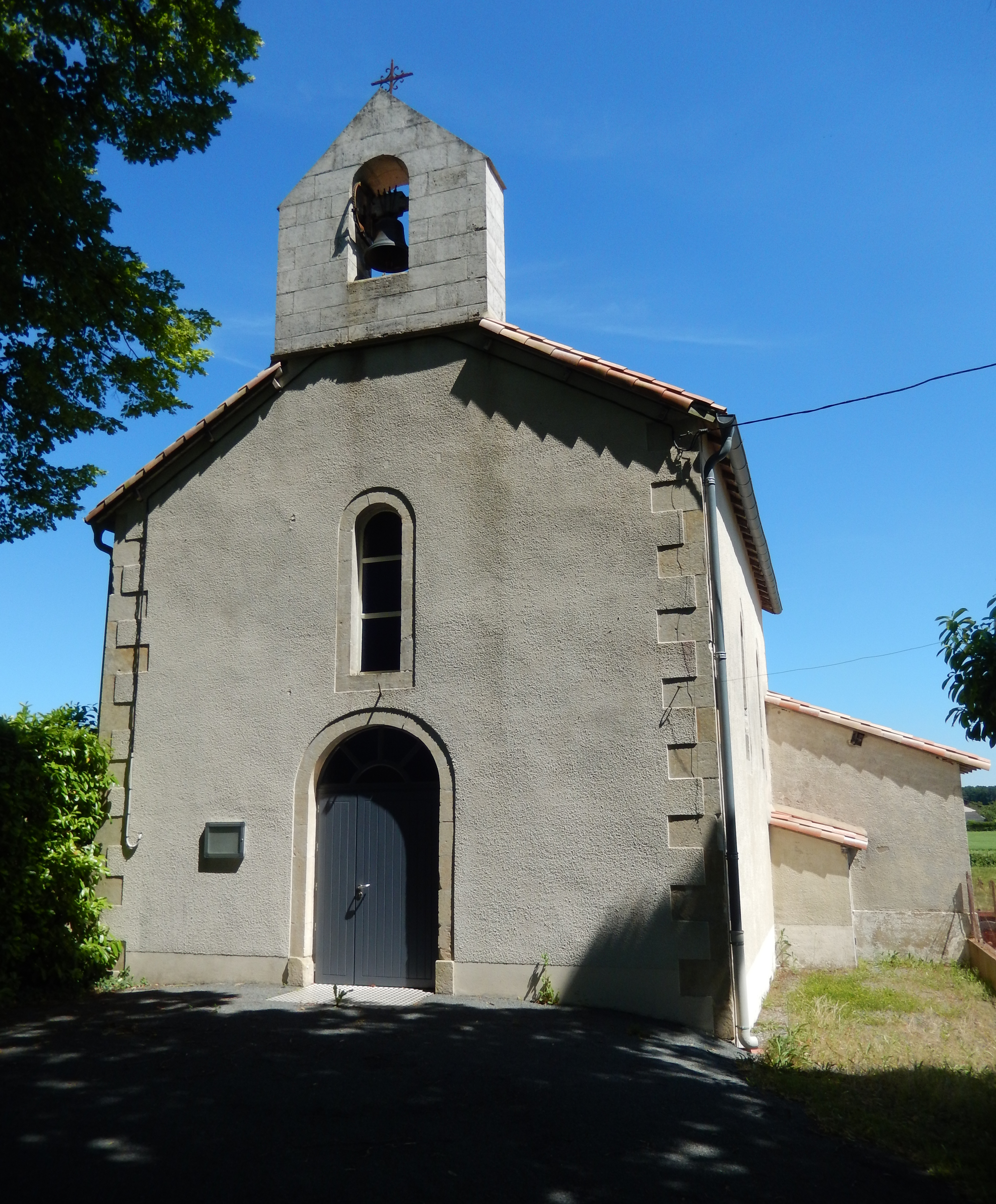 La chapelle Notre-Dame de Villemain, dans les Deux-Sèvres. Elle fut bâtie au dix-neuvième siècle.